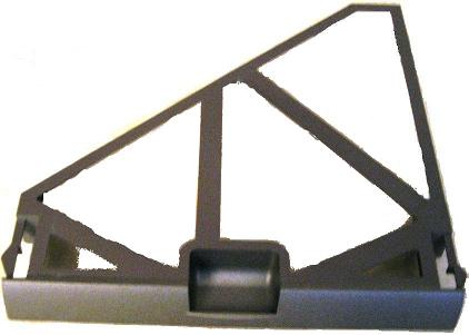 Cache plastique pour Media Bay. Permet d'alléger le portable pour les jours où l'on n'a pas besoin de lecteur optique.